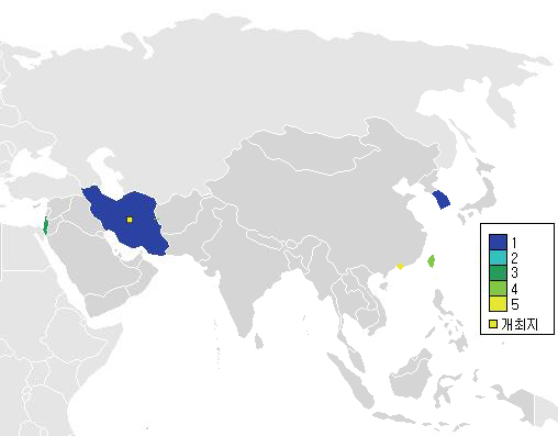 1968년 AFC 아시안컵 정보